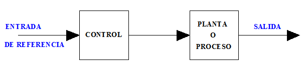 Diagrama de bloques de un sistema de control